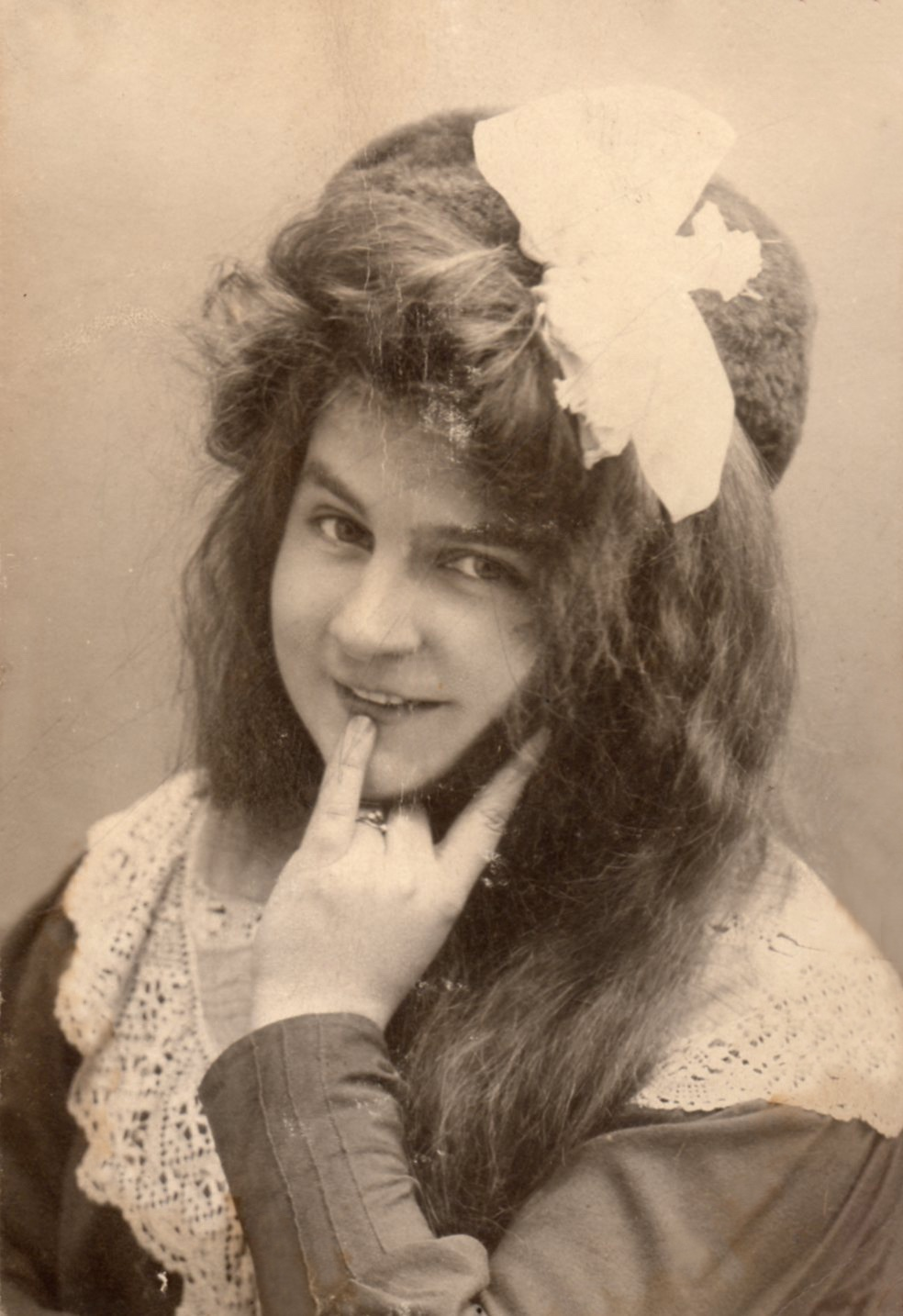 Débutphotographie 1910